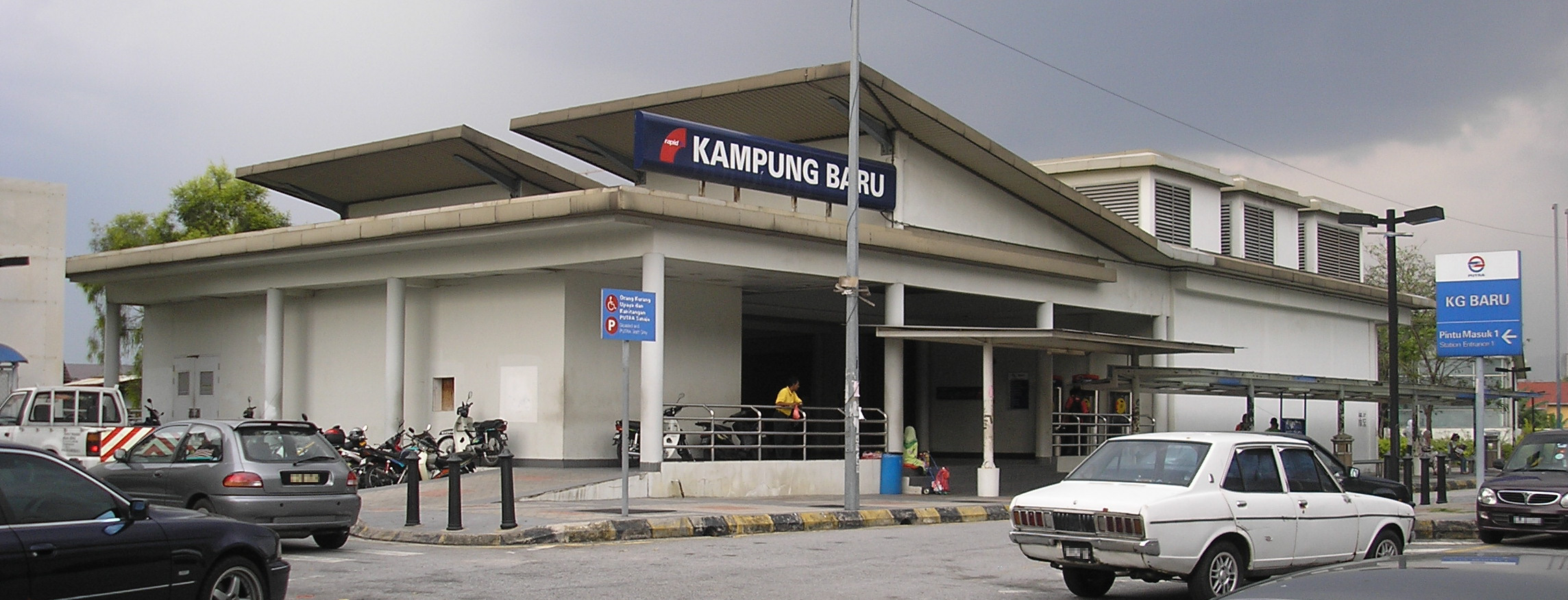 The Kampung Baru LRT station (Kelana Jaya Line) (exterior), Kuala Lumpur, Malaysia.